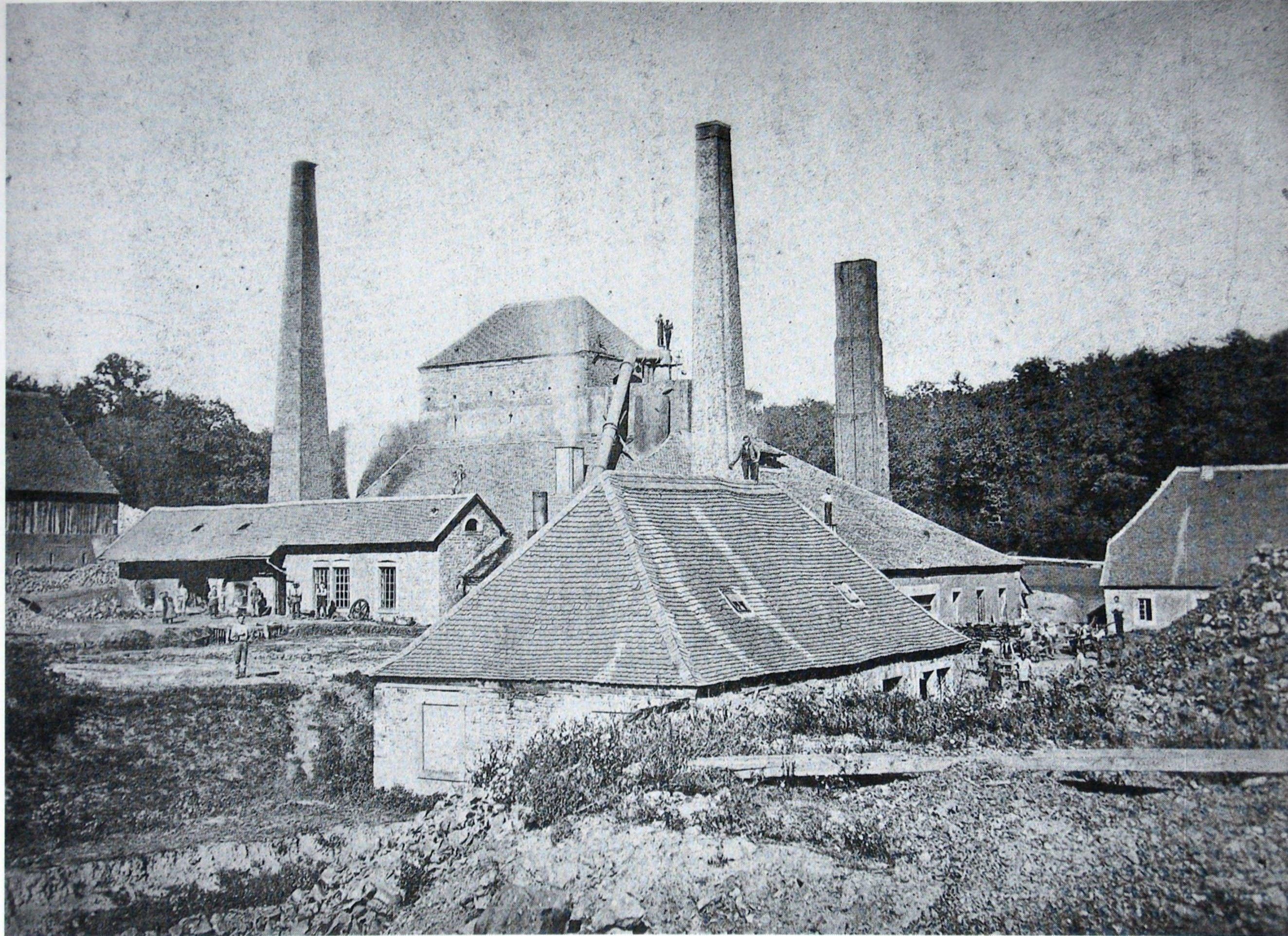 Hochofen in Neunkirchen (Saar): Neunkircher Eisenwerk "Obere Schmelz" 1865